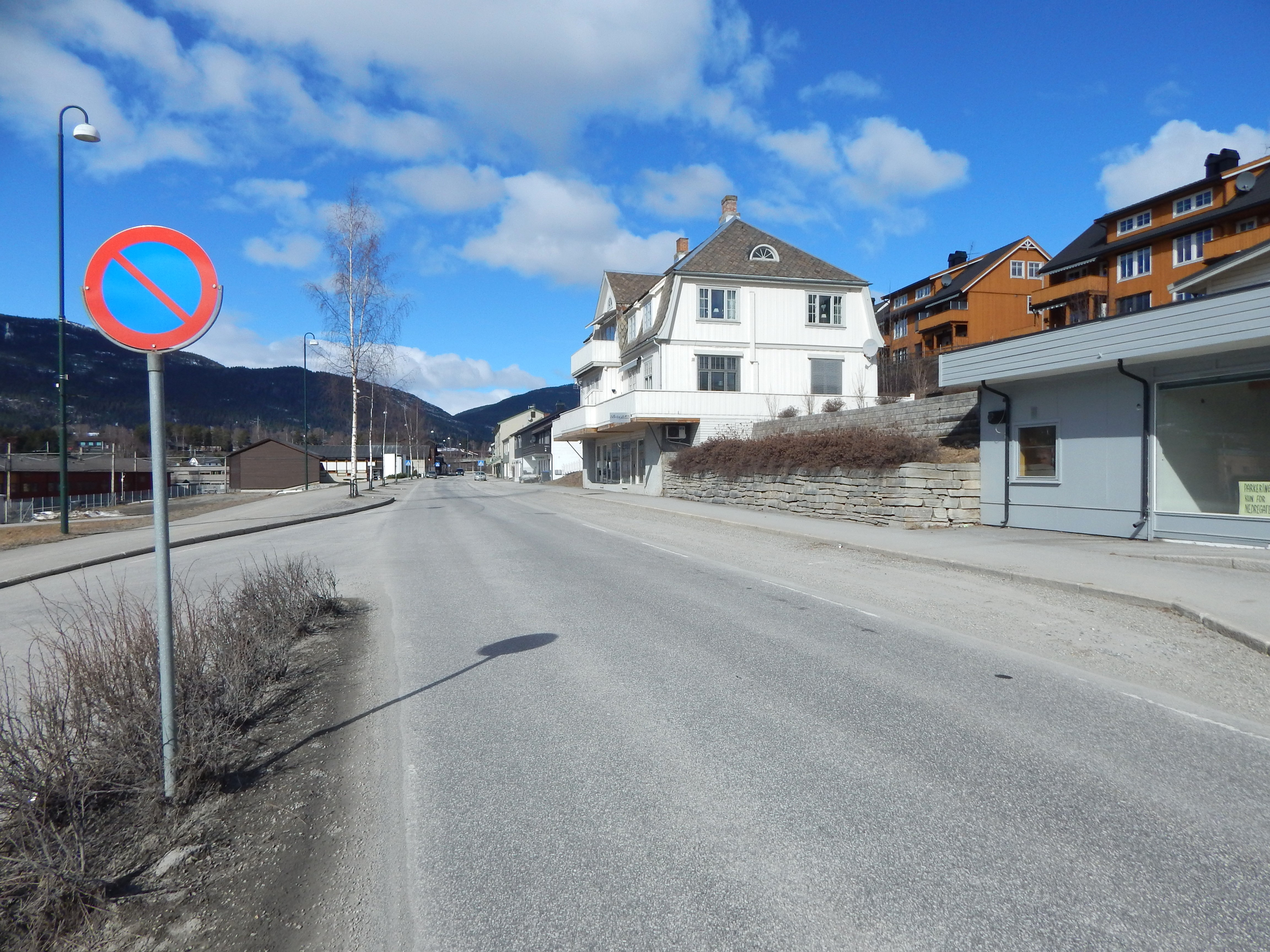 Nordre del av Nedregata på Vinstra (fylkesvei 410)